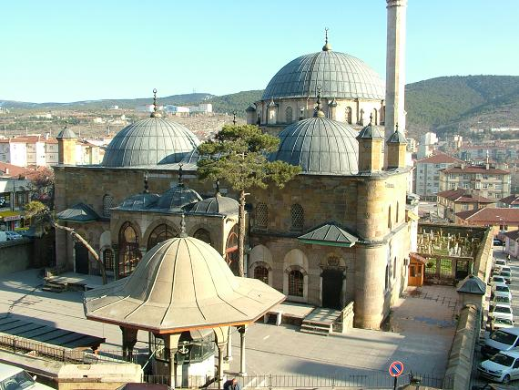 Çapanoğlu Mosque